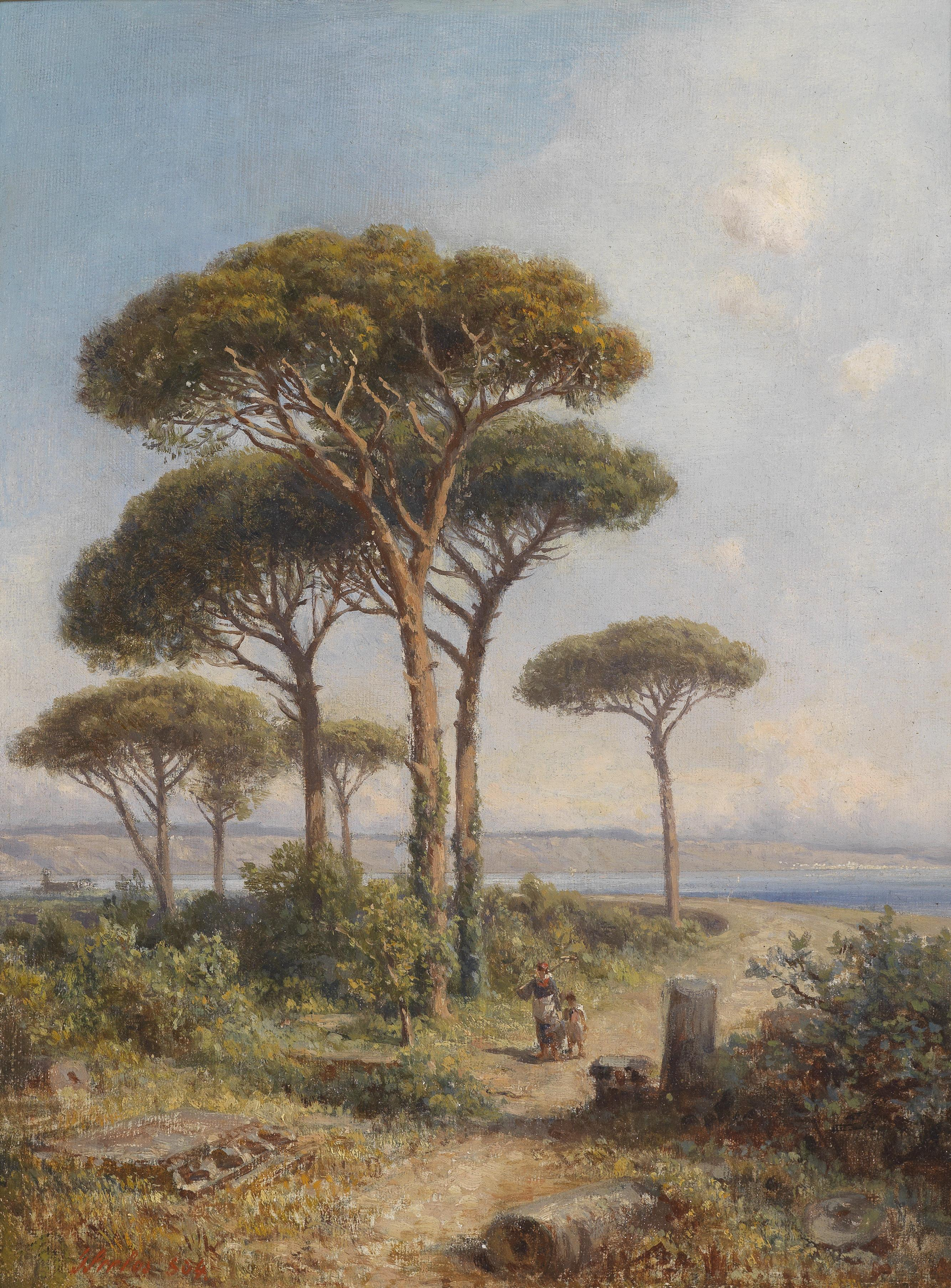 Südliche Landschaft mit figürlicher Staffage, signiert, datiert I Seelos (1)864, Öl auf Leinwand, 32 x 24 cm